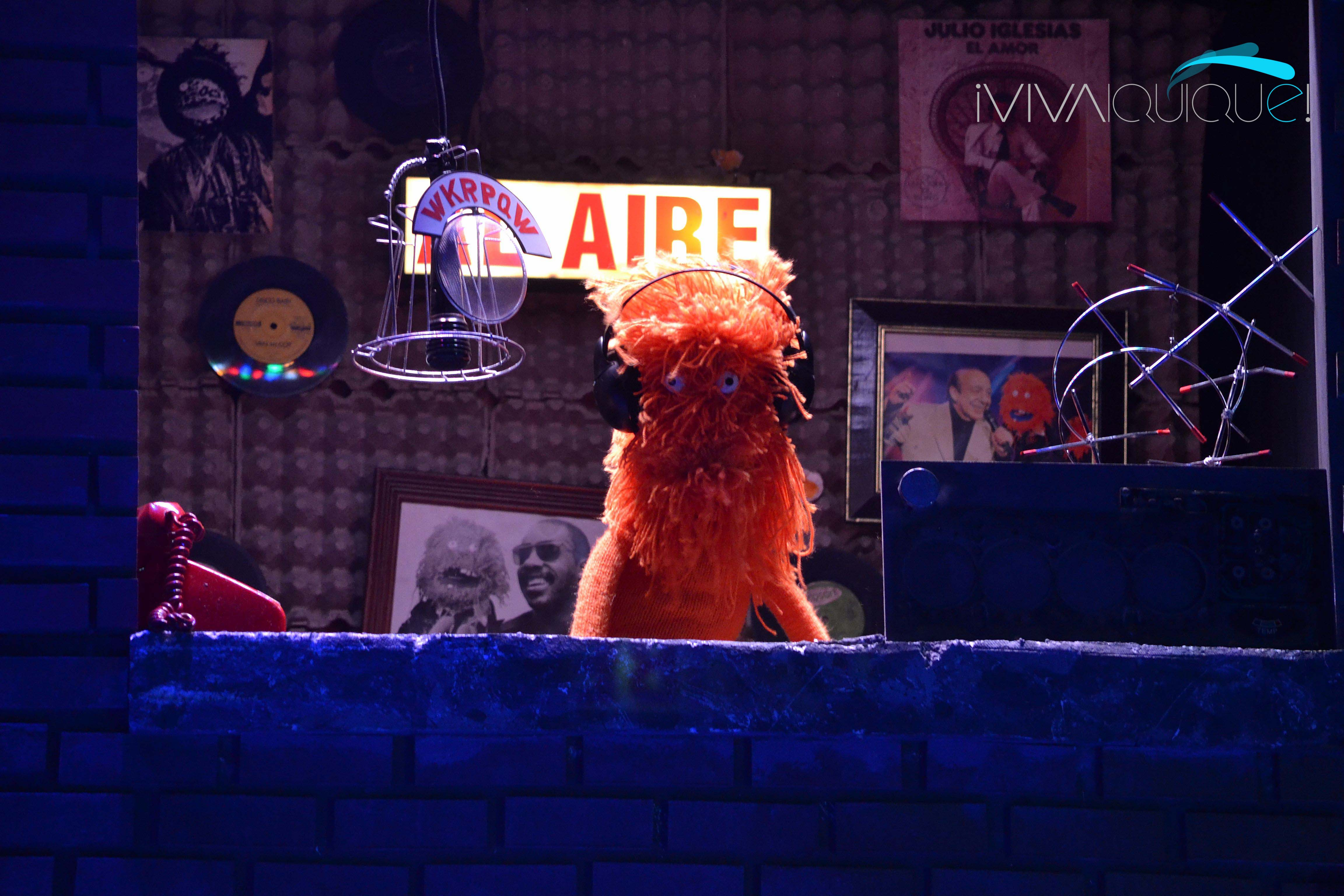 Fotografías: Gabriel Muñoz Ubal.